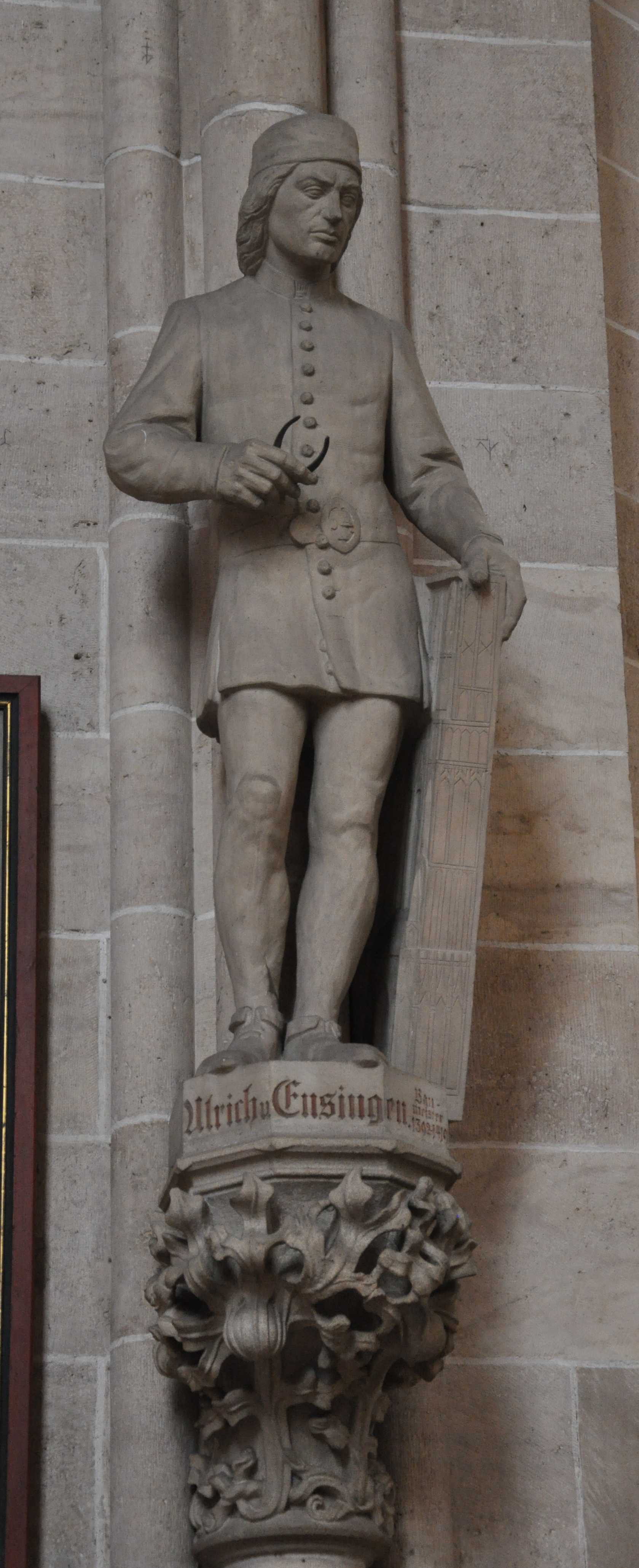 Ulm, Ulmer Münster, Statue Ulrich von Ensingen (Ulrich Ensinger), Bildhauer: Hermann Lang, 1911/1912